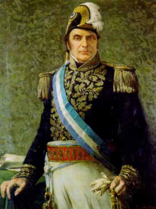 Retrato del presidente de la Confederación Argentina Justo José de Urquiza. Óleo sobre tela de Luis de Servi.